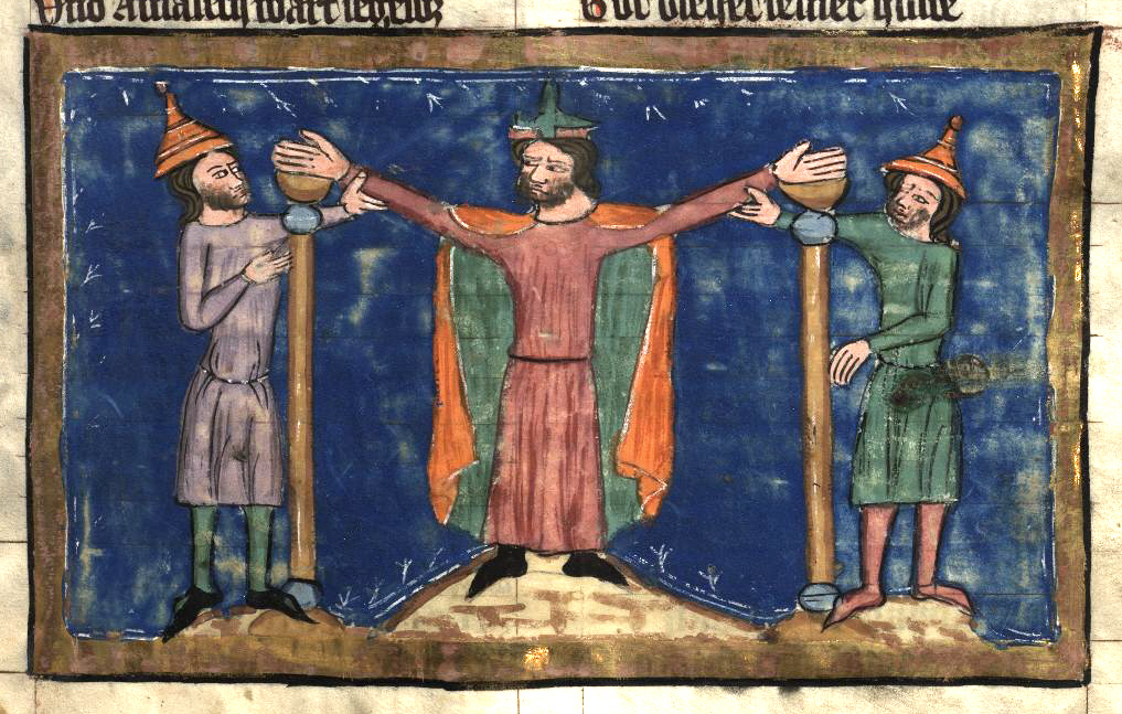 Rudolf von Ems: Weltchronik. Böhmen (Prag), 3. Viertel 14. Jahrhundert. Hochschul- und Landesbibliothek Fulda, Aa 88. Bildbeschreibung nach Martin Roland. Miniatur 43 105r Mose werden die Arme hochgehalten